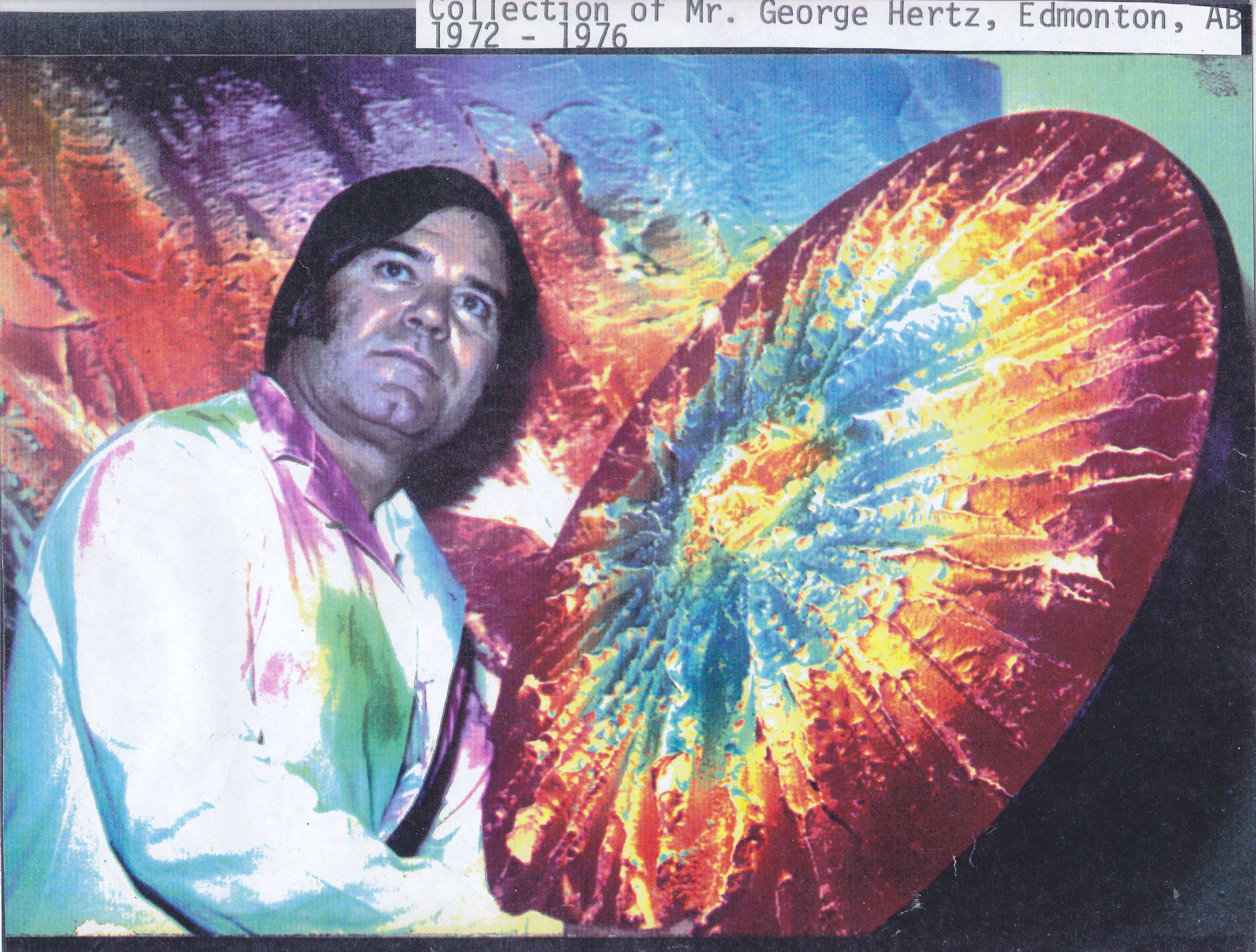 Painter of the stars, Andre Fontaine and his works .